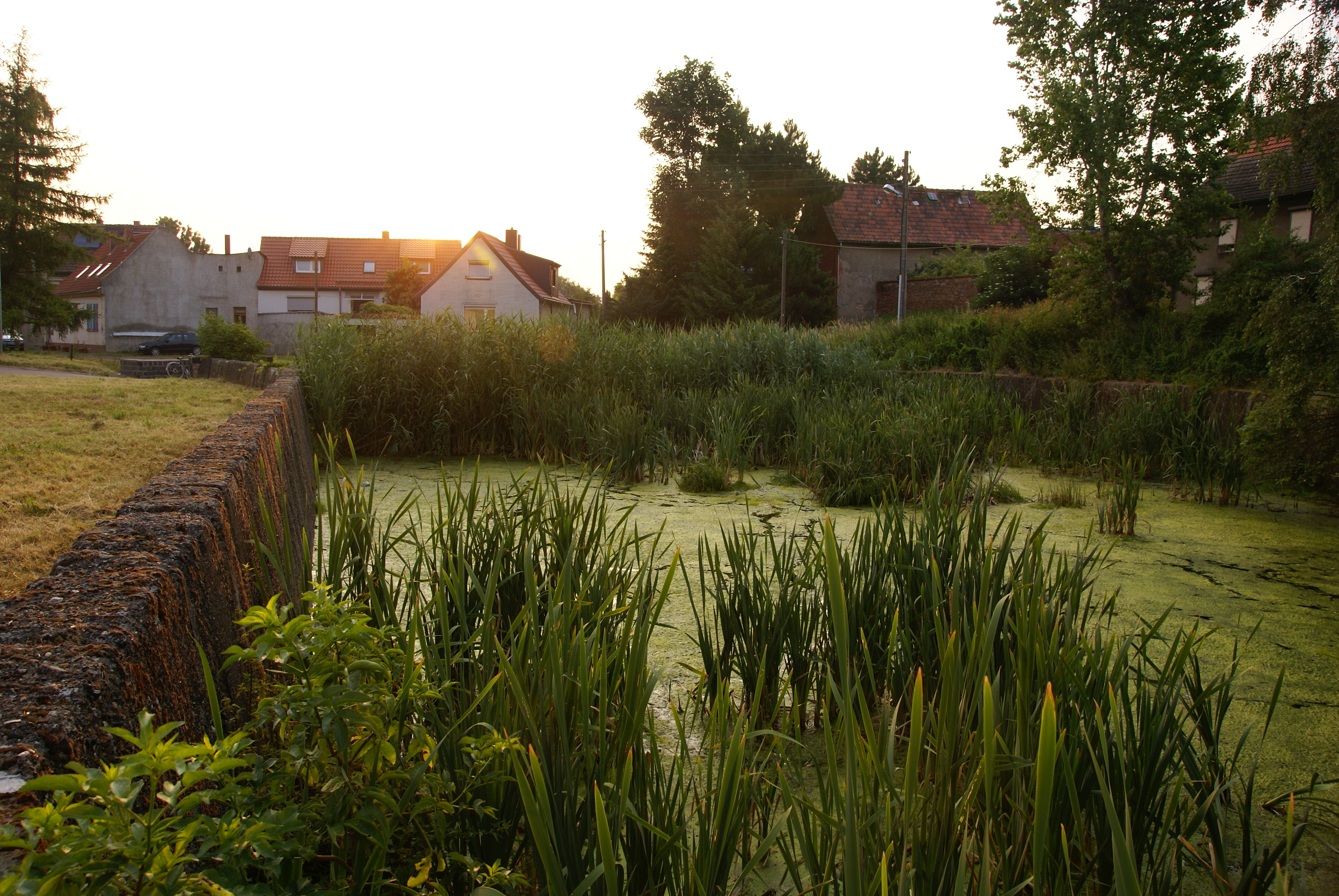 Blick auf dem Dorfteich des Dorfes Siersleben im Landkreis Mansfeld-Südharz,Aufnamezeitpunkt war gegen 6 uhr Morgens